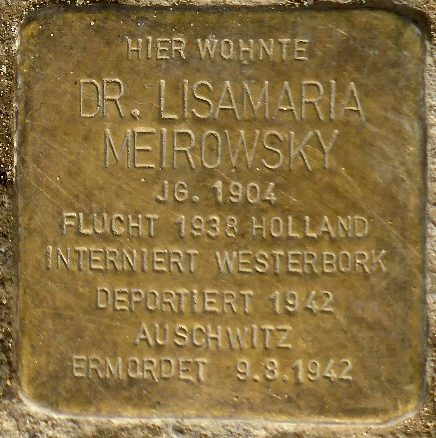 Stolperstein für Dr. Lisamaria Meirowsky, Köln-Lindenthal, Fürst-Pückler-Str. 42 (Zustand Ende März 2015)